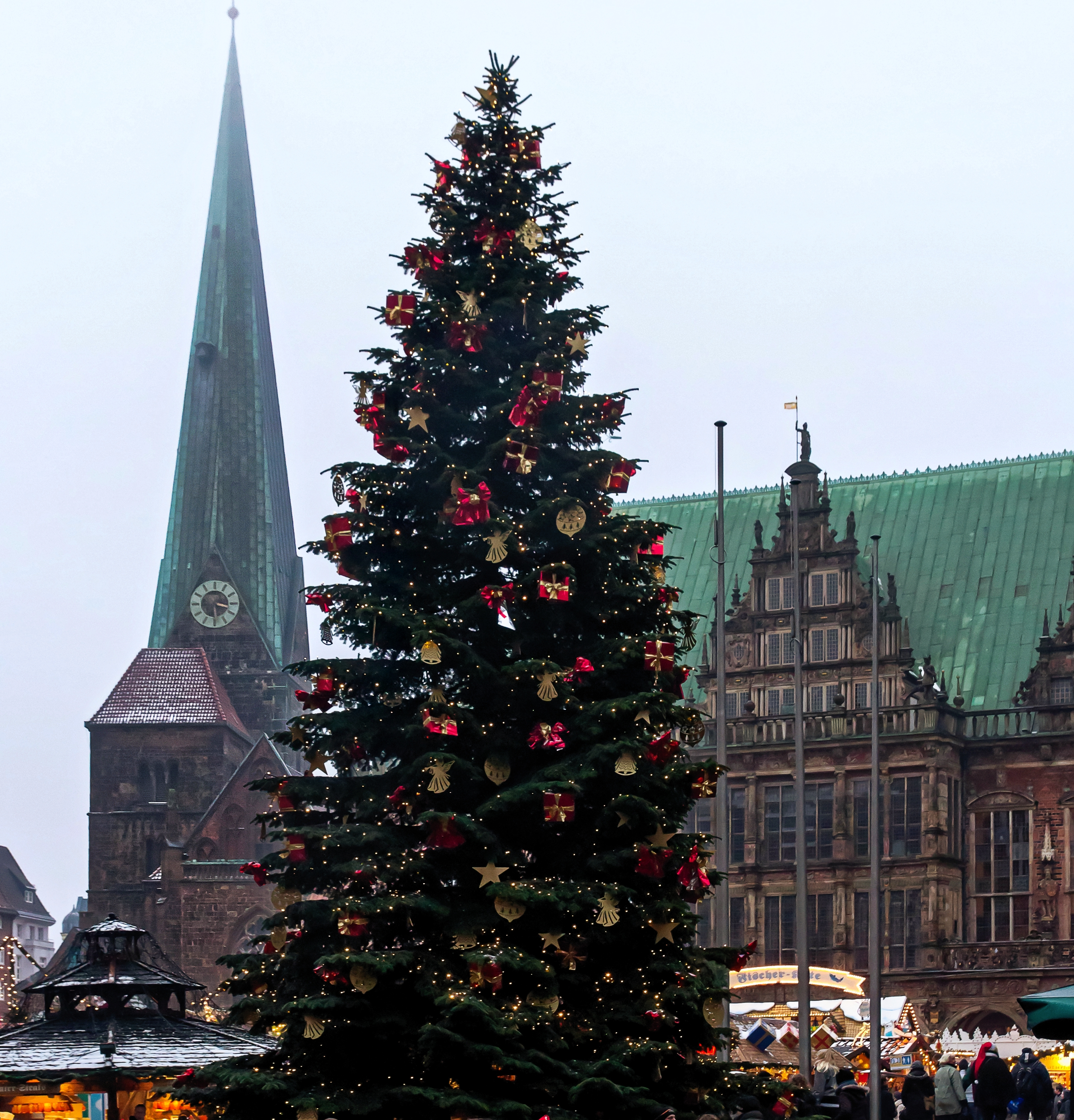 Bremer Weihnachtsmarkt 2012 in Bremen (Freie Hansestadt Bremen, Deutschland). Blick auf den Bremer Marktplatz: im Vordergrund der große, geschmückte Weihnachtsbaum, der jedes Jahr zur Advents- und Weihnachtsmarktzeit an dieser Stelle aufgestellt wird; im Hintergrund links die Liebfrauenkirche und rechts das Bremer Rathaus.